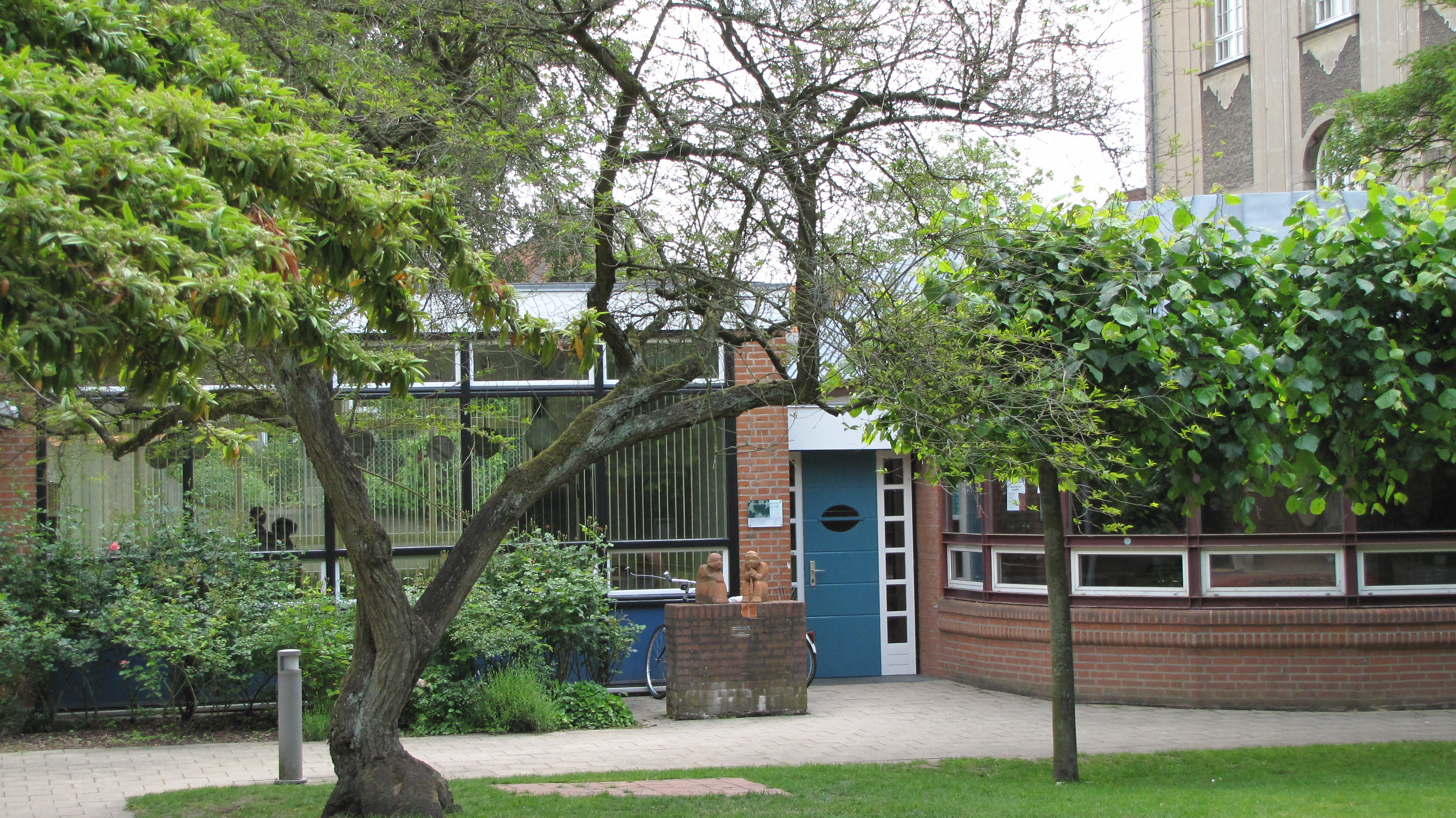 Probenheim der Lübecker Kanbenkantorei im Garten der Gemeinnützigen, Königstr. 5